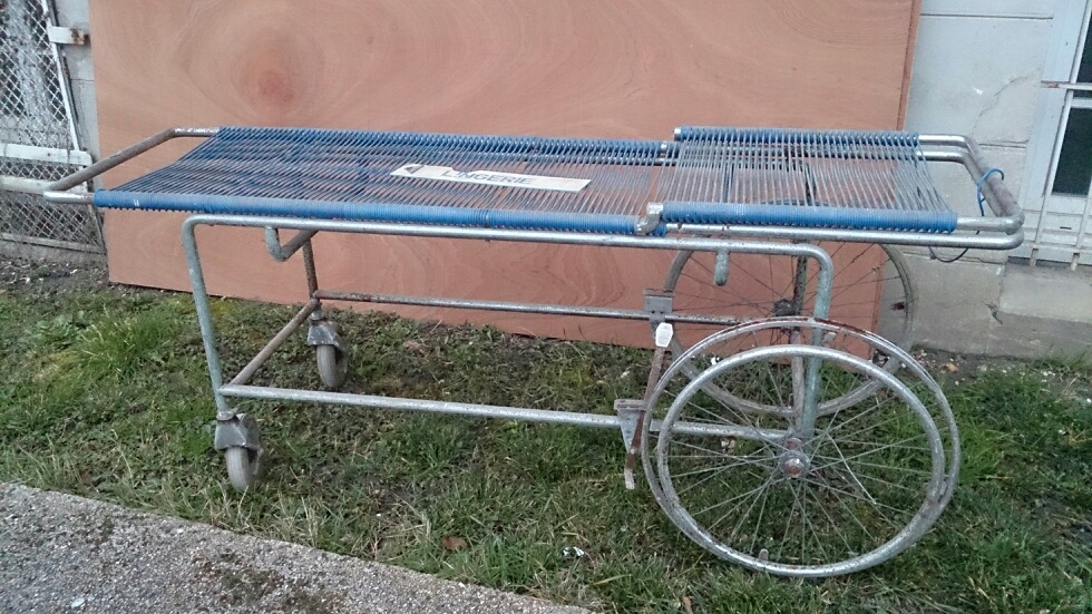 Un ancien brancard d'hopital